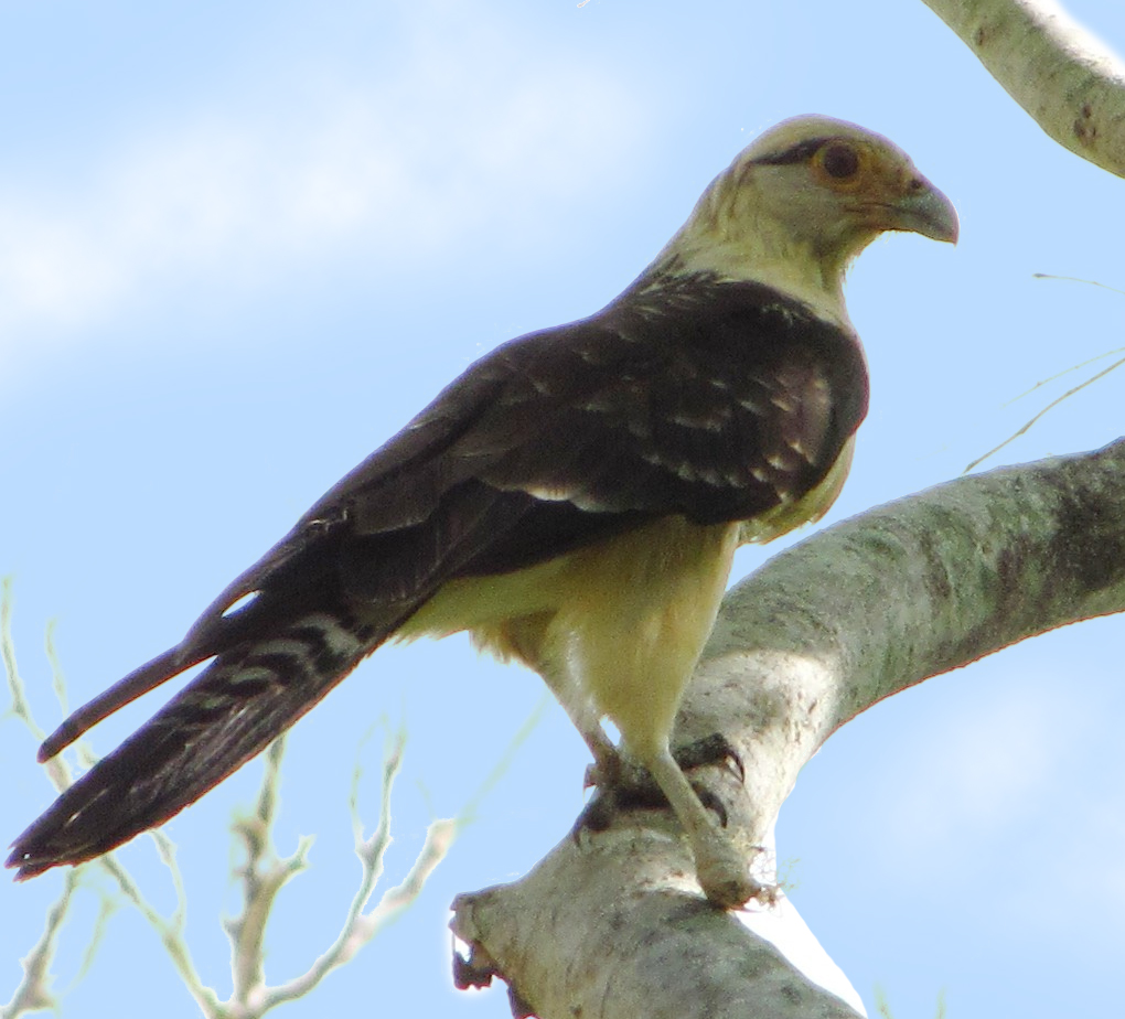 Milvago chimachima cordatus Lugar / place / lieu : Embalse de Camatagua, Estado Aragua, Venezuela.